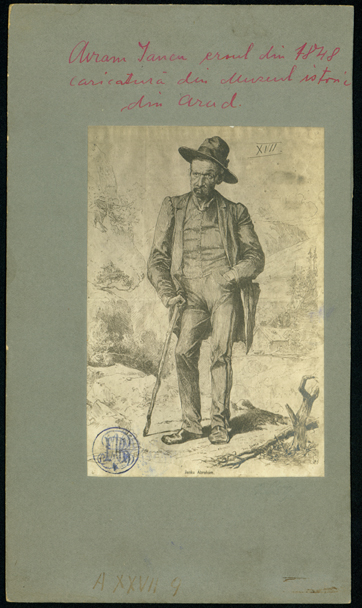 Adler - Caricatura lui Avram Iancu din Muzeul de istorie Arad, jud. Arad